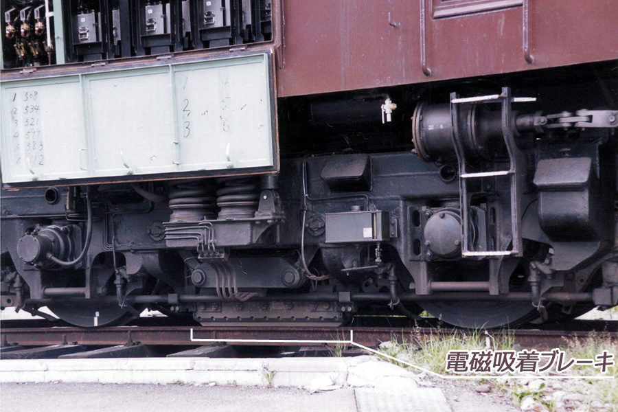 EF63の電磁吸着ブレーキ作動状態(1997年7月20日 横川運転区イベントにて)